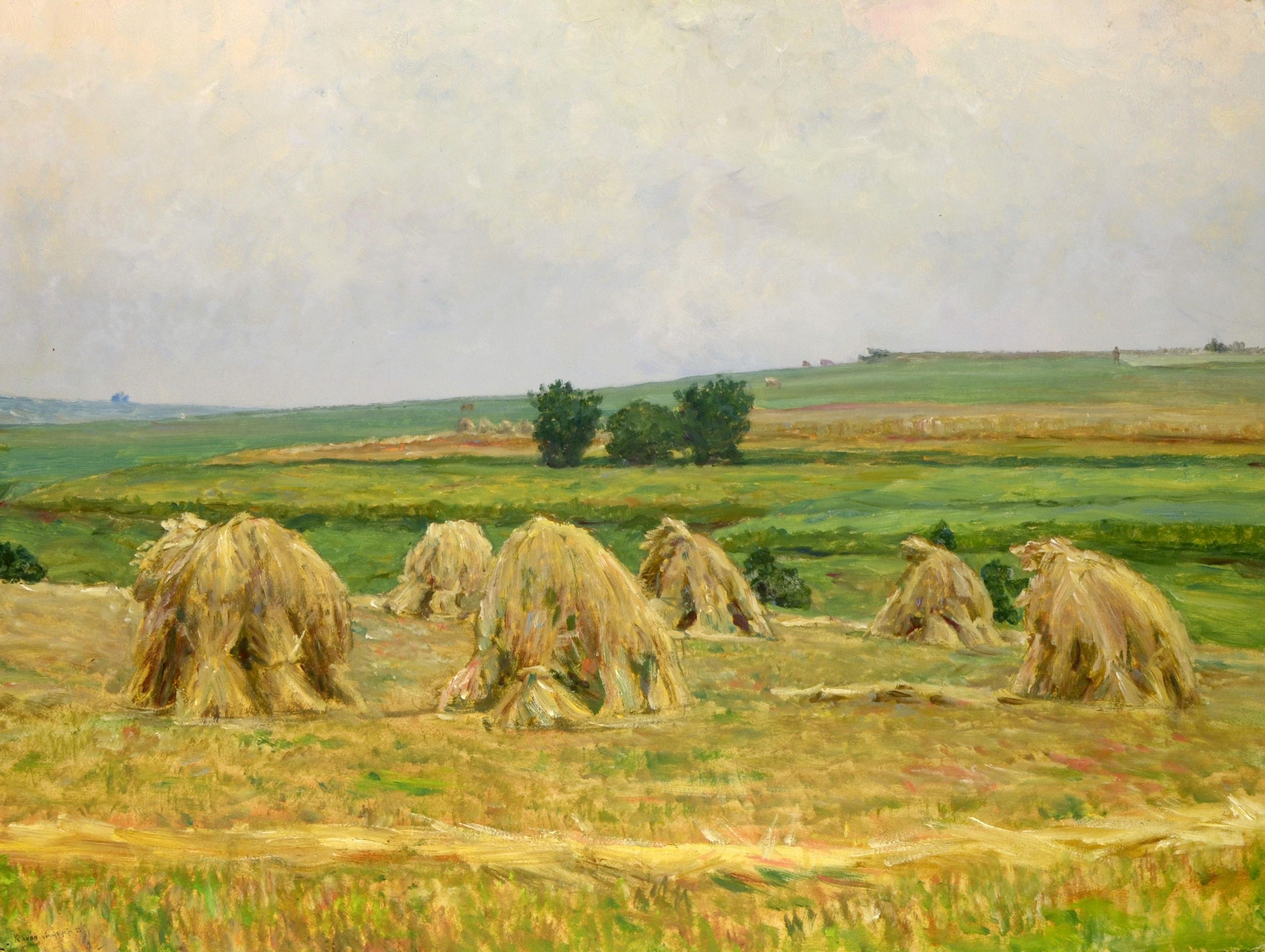 Rovinatá pozdně letní krajina s kupkami sklizeného sena